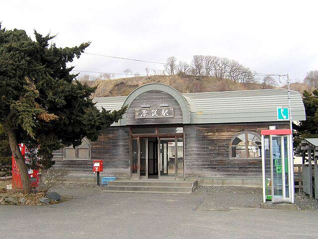 Atsuga Station in Hidaka Main Line, Japan